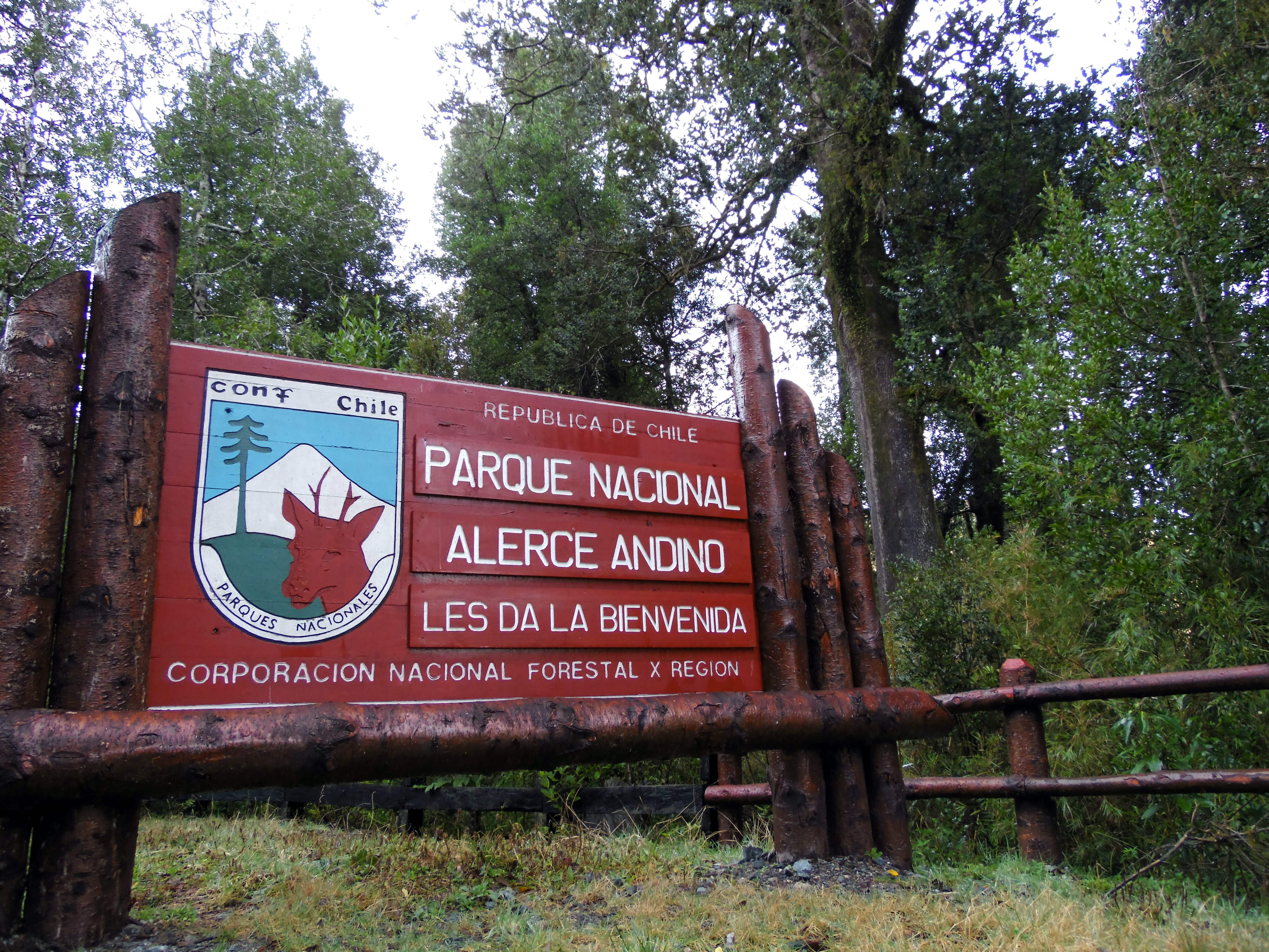 Letrero, Parque Nacional Alerce Andino. Región de Los Lagos, Chile.